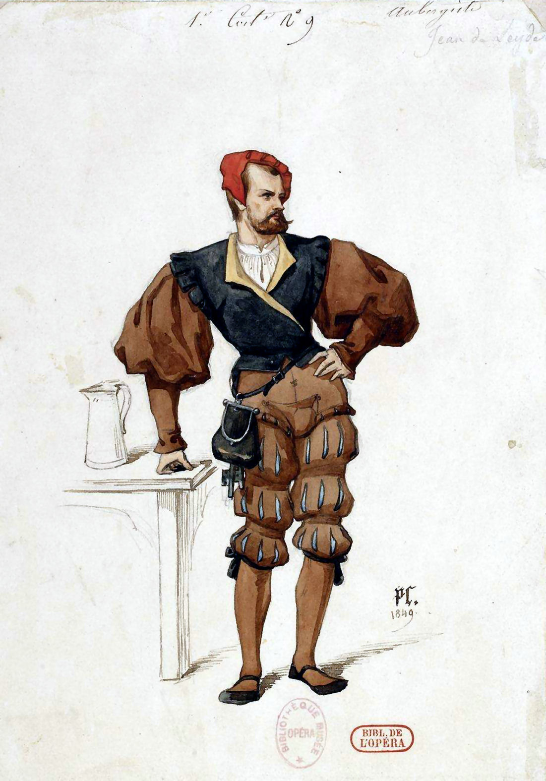 Le prophète : costume d'aubergiste de Jean de Leyde (1849) / par Paul Lormier (1813-1895)